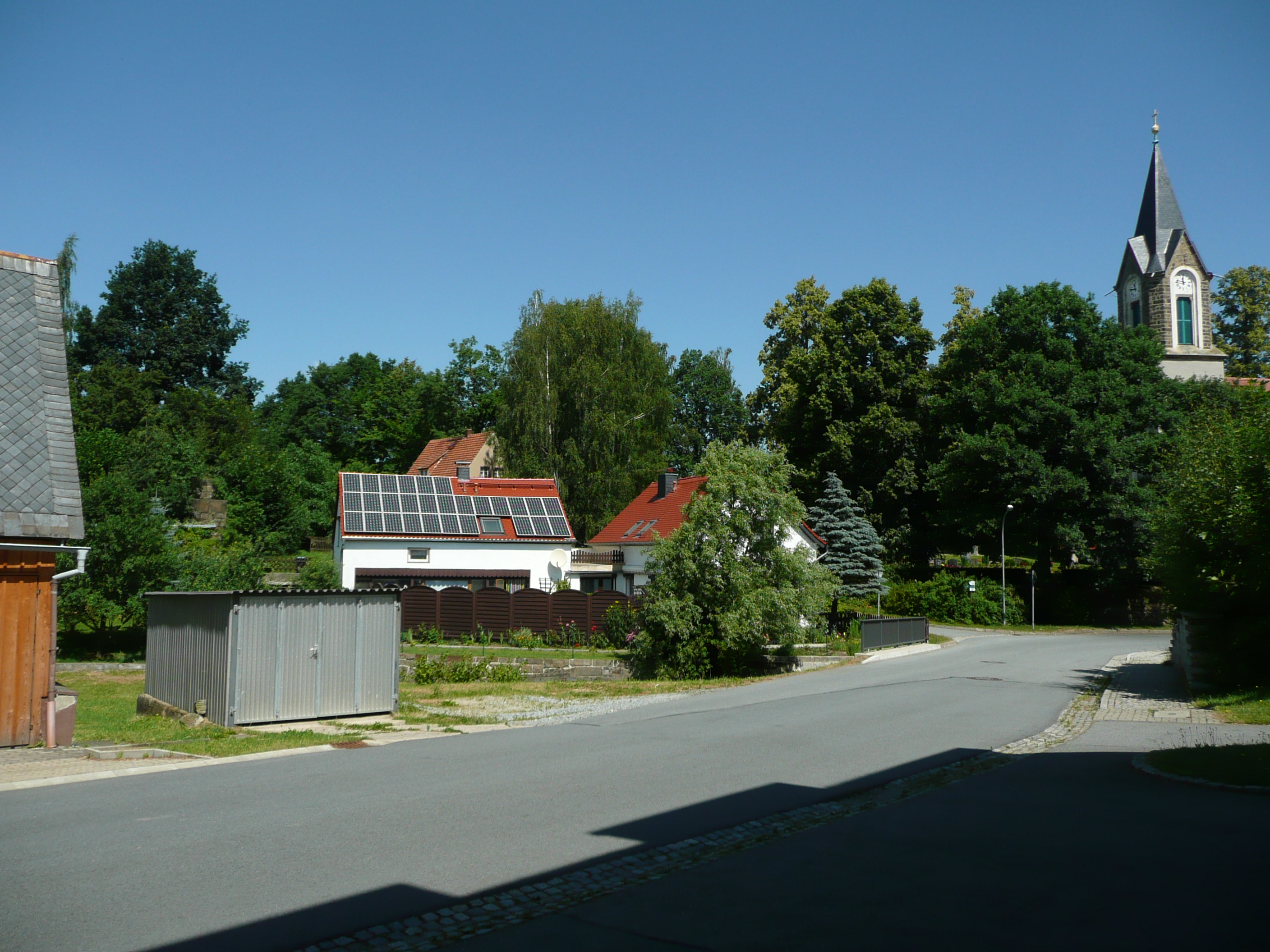 Widerlager des ehemaligen Viaduktes der Schmalspurbahn in Dürhennersdorf